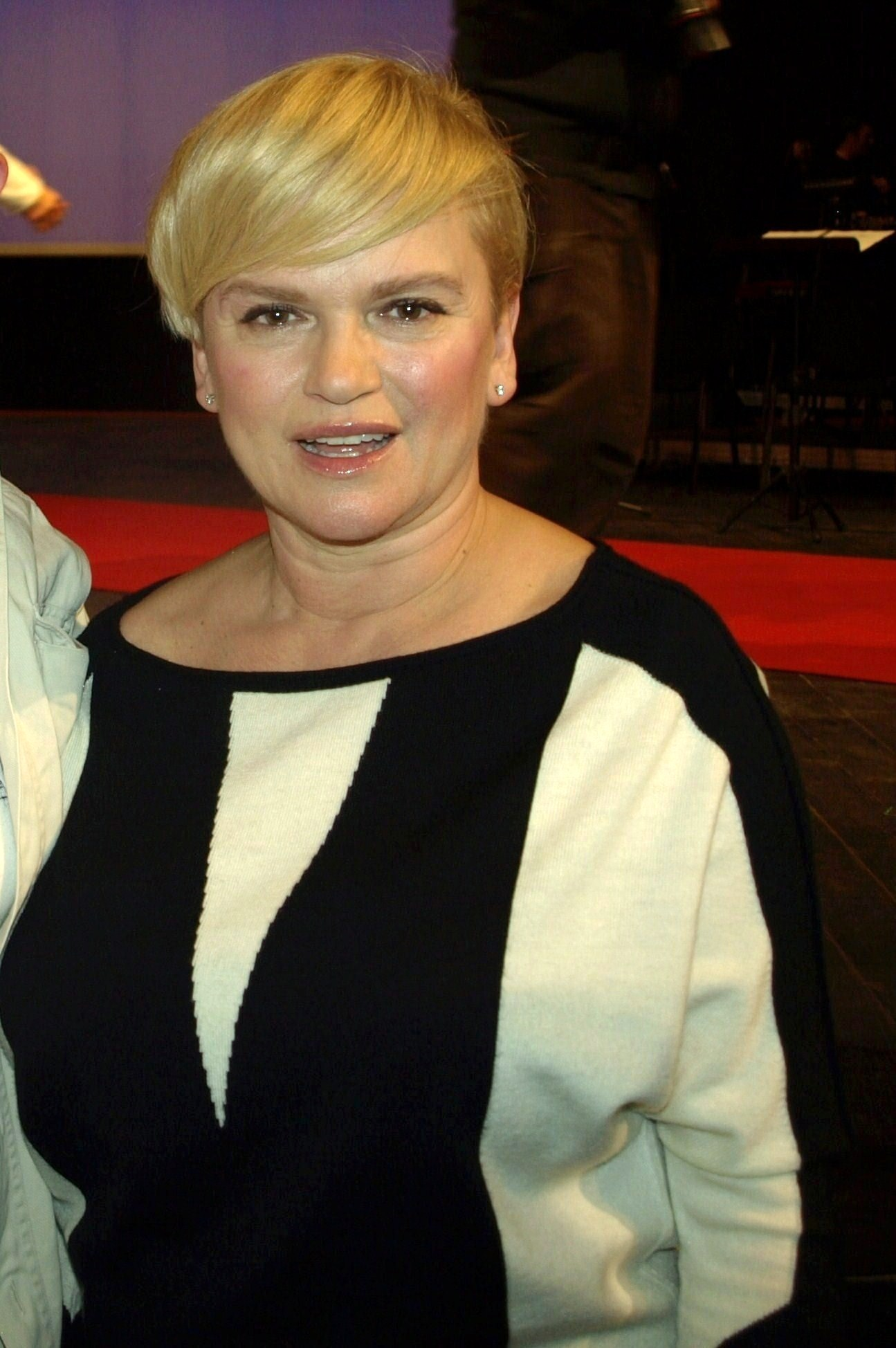 Katarzyna Figura, aktorka.